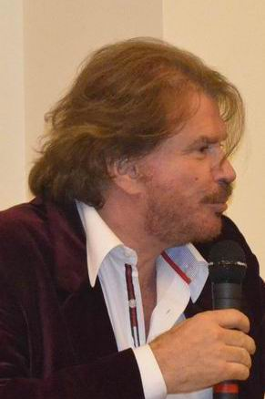 Bigote en el 40 Aniversario Un Dos Tres